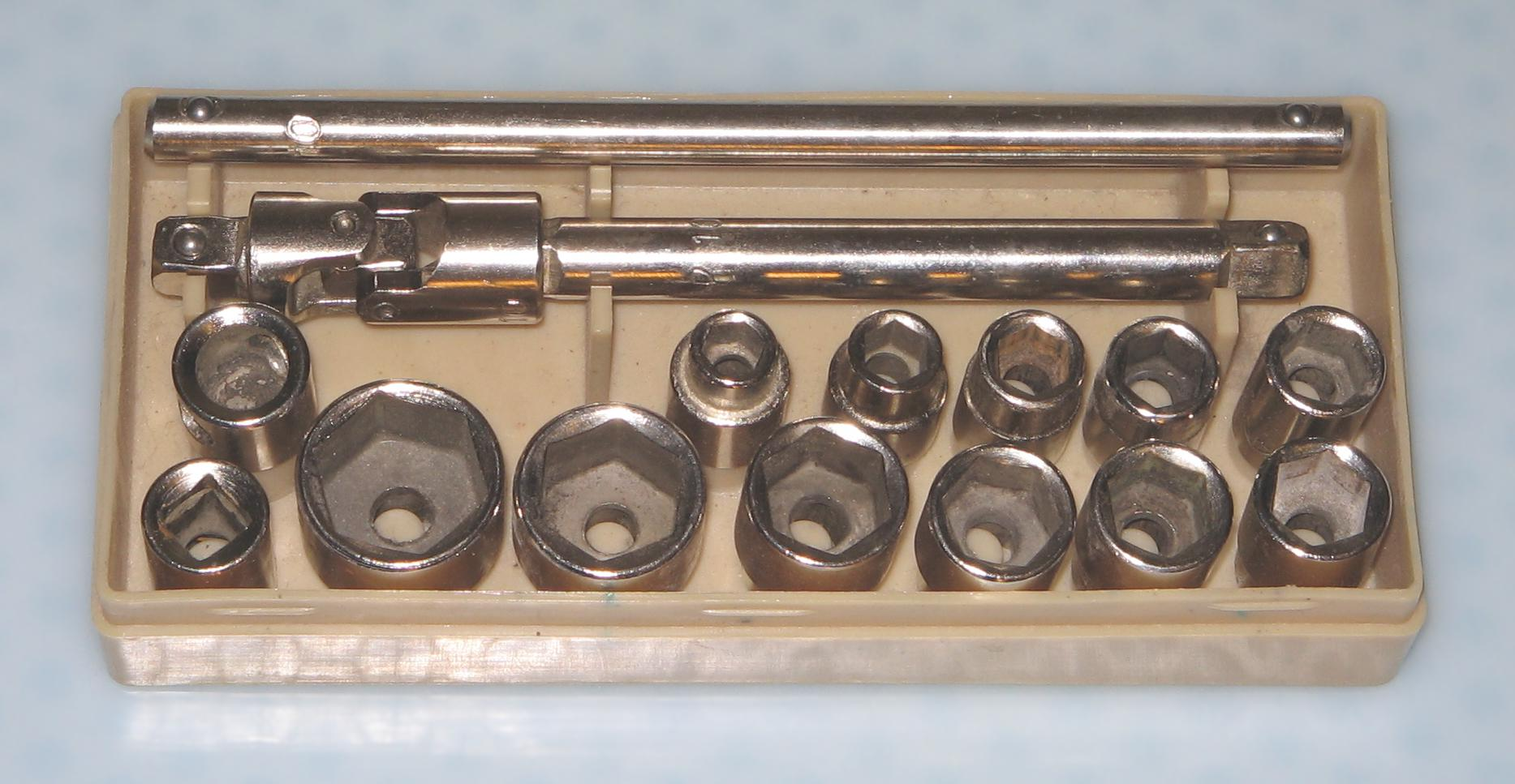 Aro de ajxoj por munti finajn rencxilojn por boltoj kaj sxrauxbingoj de diversaj grandoj La foto estis farita de mi mem.